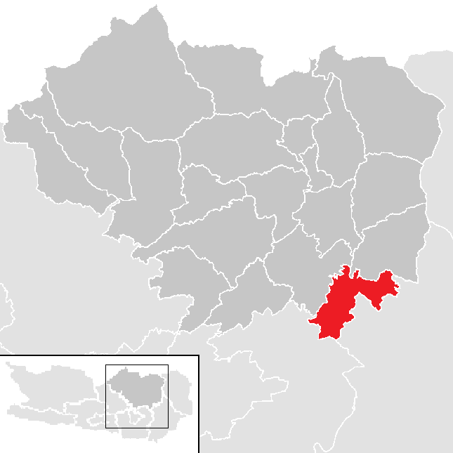 Bezirk Sankt Veit an der Glan